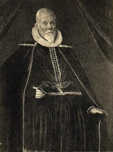 Jørgen Lykke, dansk rigsråd